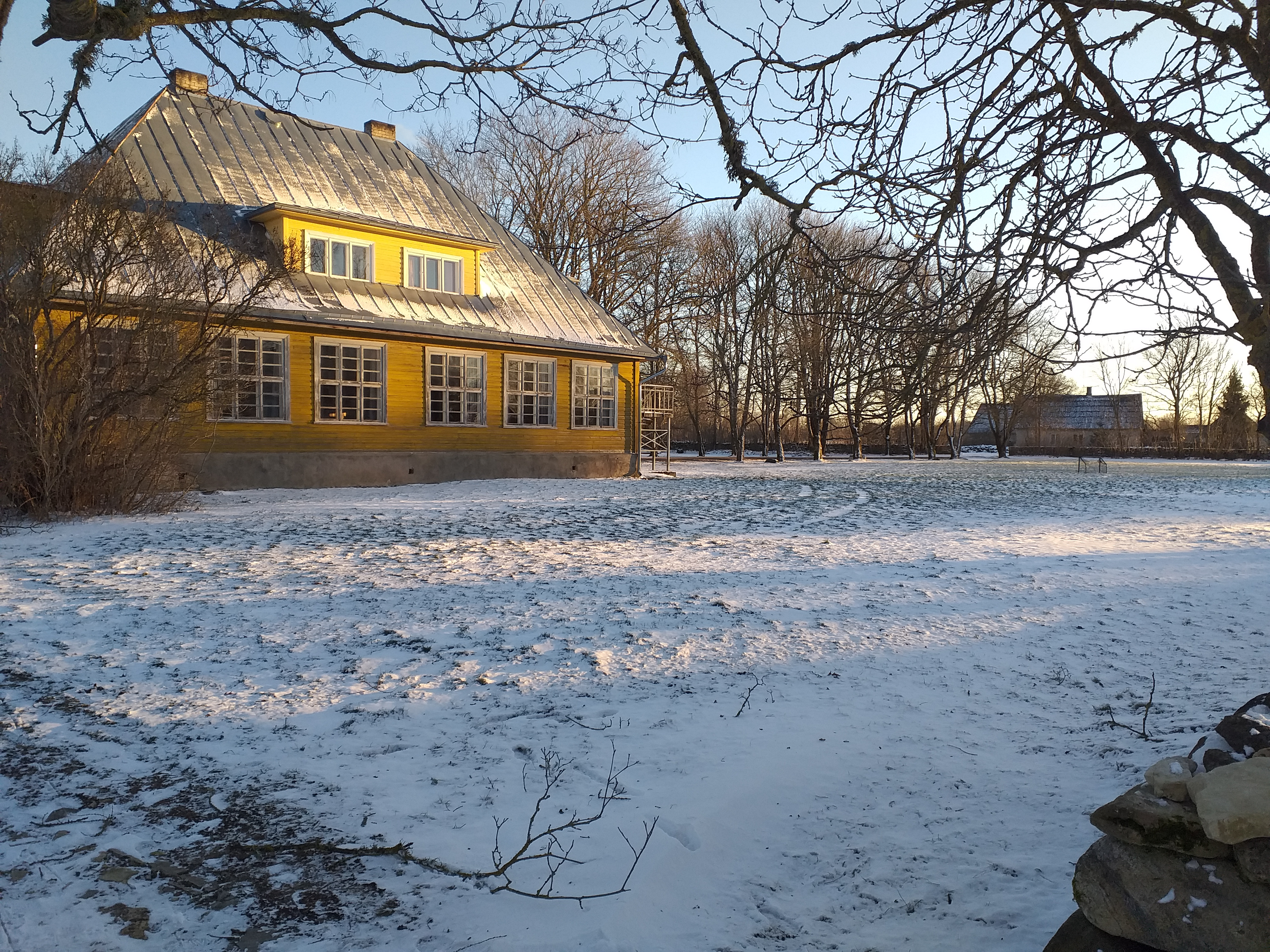 Tagavere seltsimaja